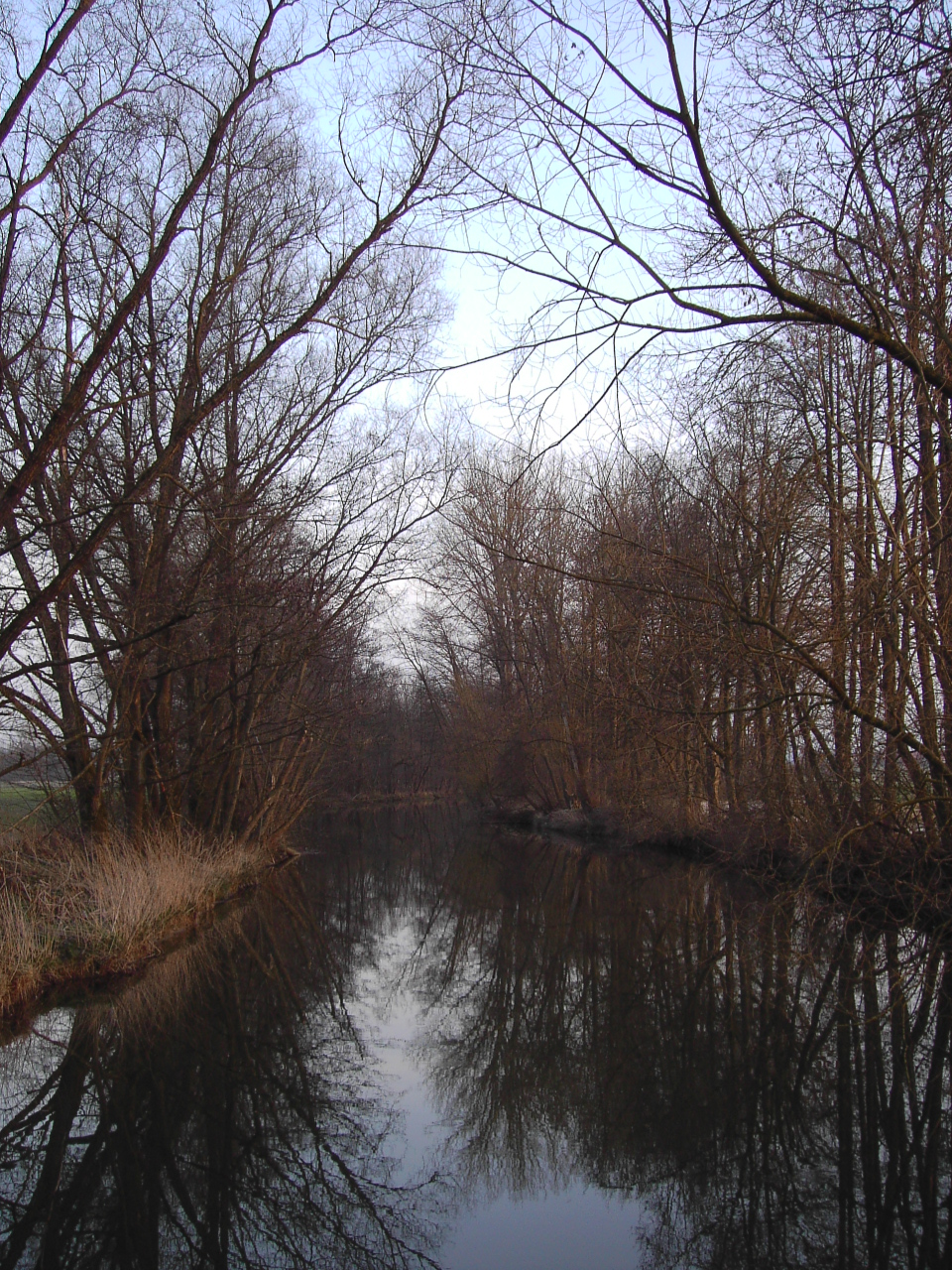 Spiegelung am Fluss "Ilm"